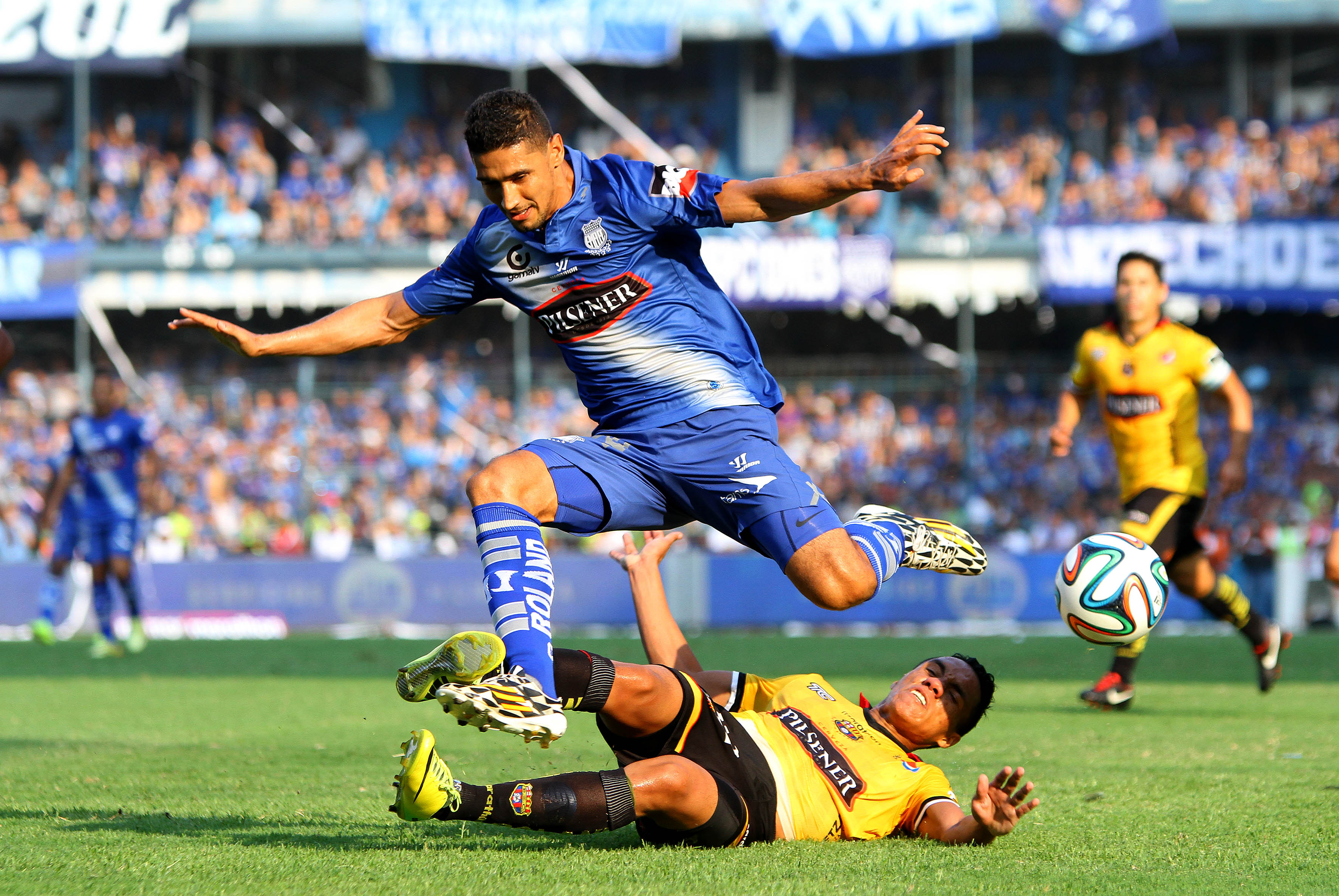 Guayaquil, Ecuador, 21 de diciembre del 2014 (ANDES).-Emelec enfrenta a Barcelona en el partido que define al Campeón del Torneo Nacional de Futbol 2014